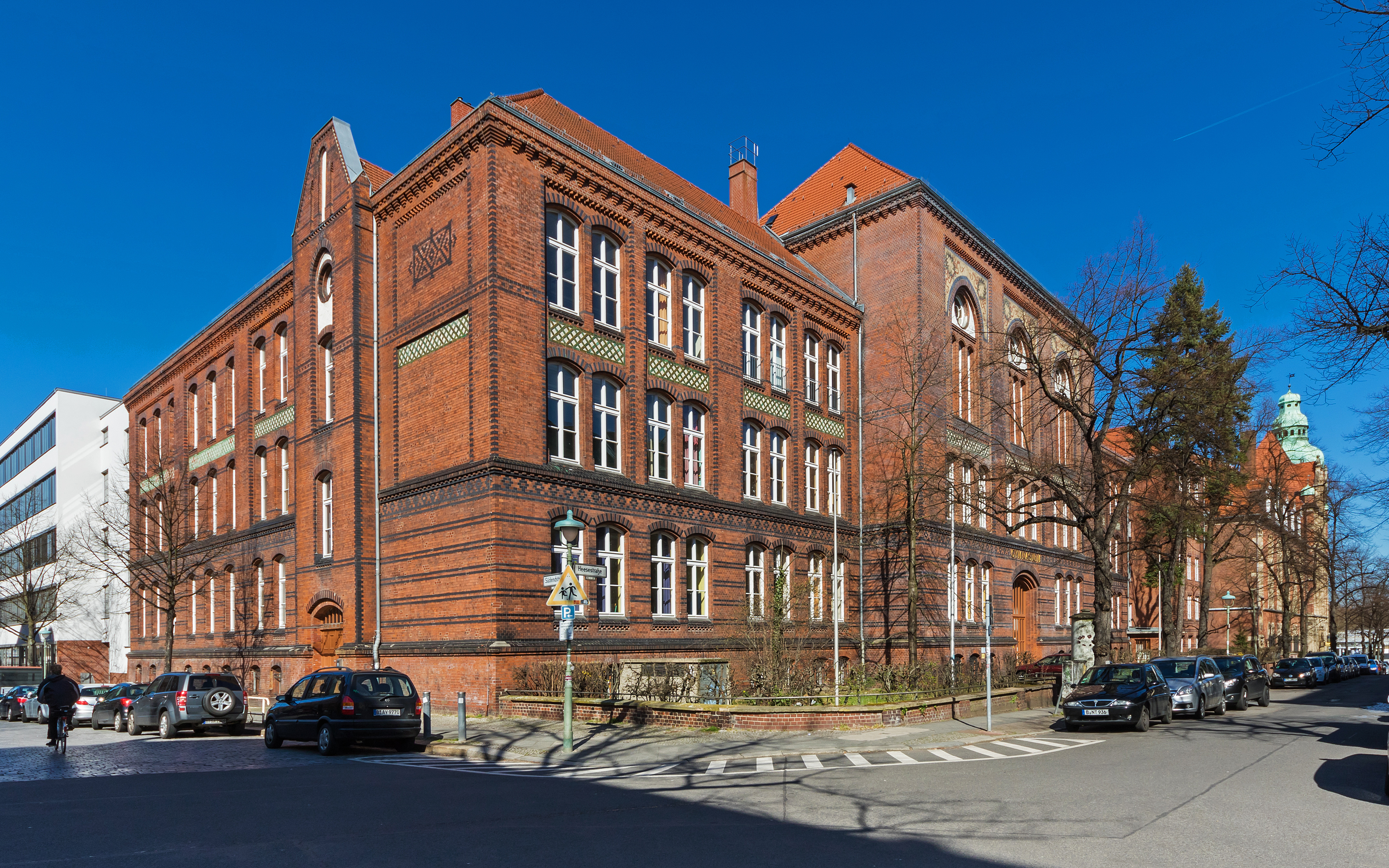 Das Gymnasium Steglitz in der Heesestraße/Südendstraße, Berlin-Steglitz